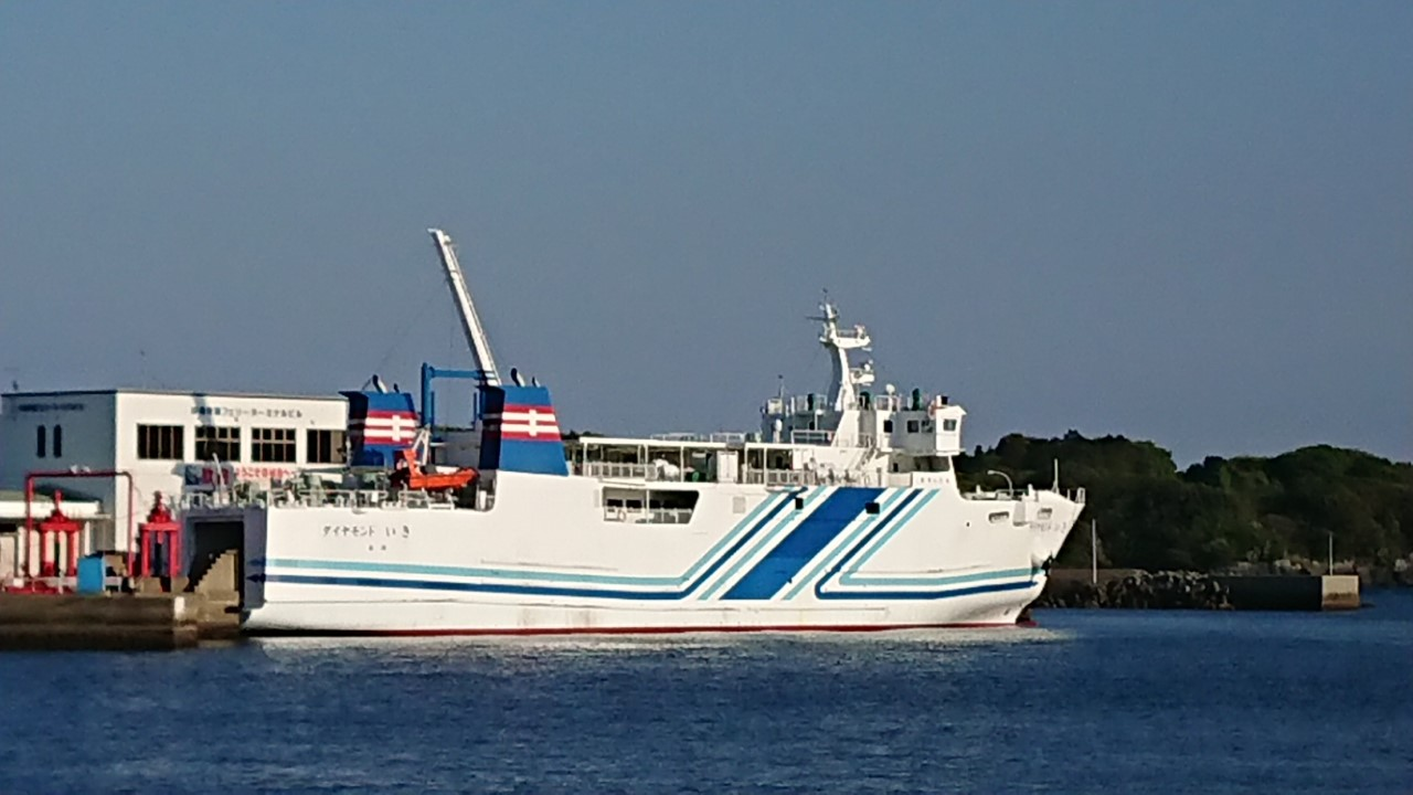 長崎県壱岐市印通寺港と佐賀県唐津東港を結ぶ九州郵船フェリーのうちの一隻。名称は「ダイアモンドいき」。九州郵船の有するフェリーで一番新しい（2019年（平成31年）4月1日就航。